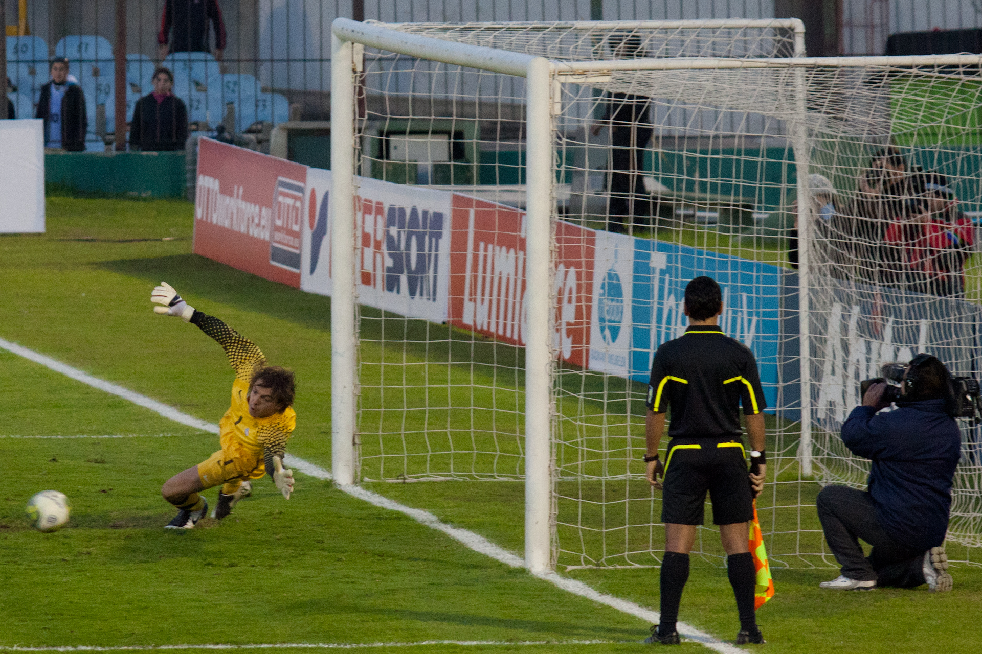 Tim Krul